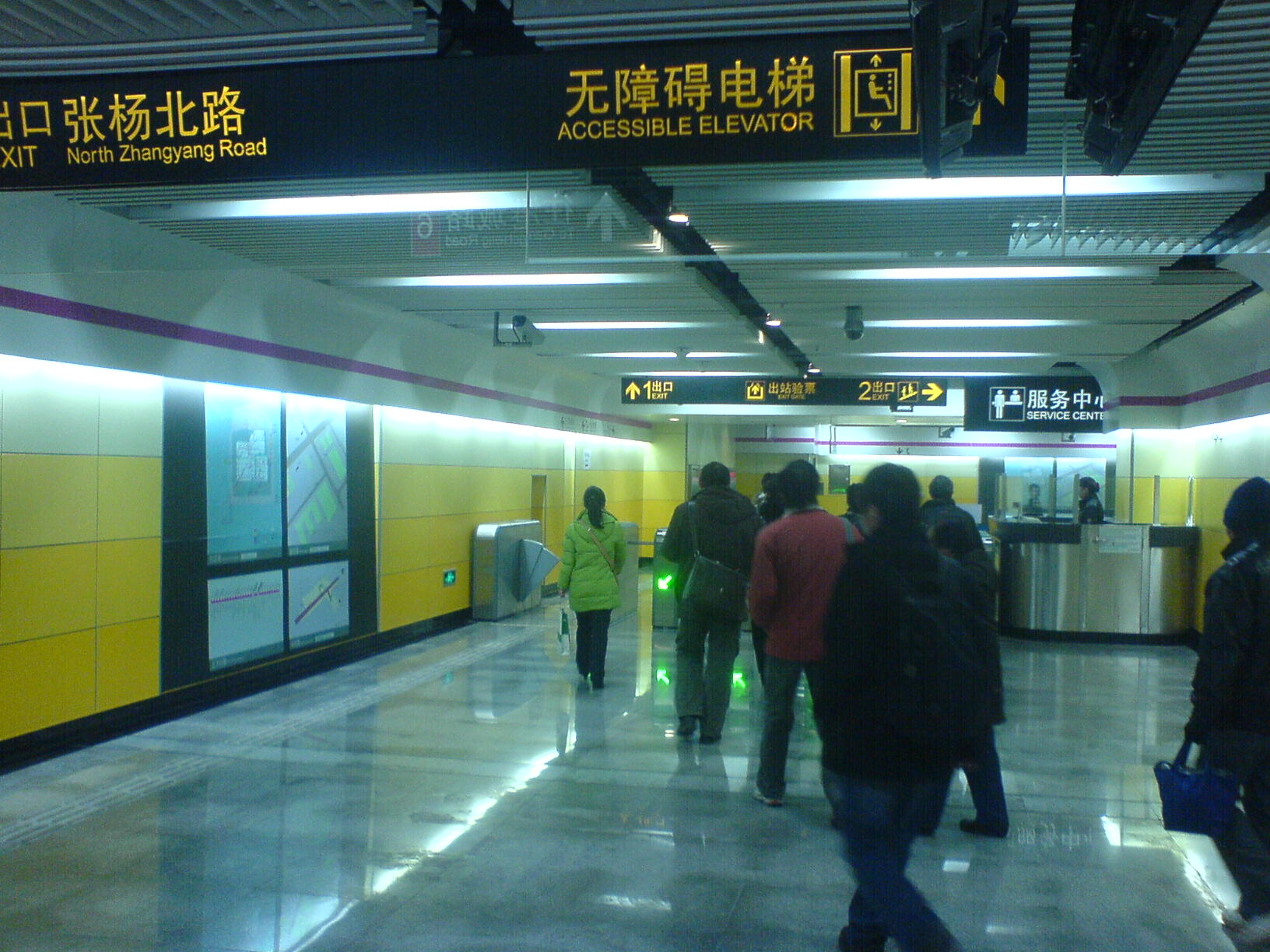 博兴路站站台